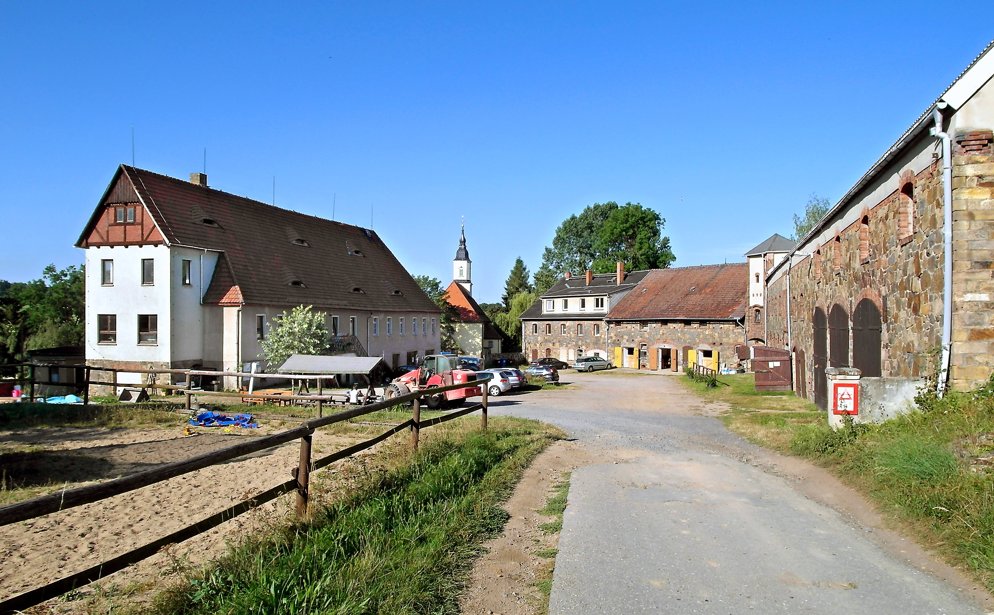 01.09.2016 09627 Naundorf (zu Bobritzsch-Hilbersdorf): Ehem. Rittergut, Grillenburger Str. 54. Blick von Osten in den Gutshof und dahinter zur Kirche. Das Rittergut entstand 1650 unter dem kurfürstlichen Kammerdiener und Hofjäger Werner Schwarz. Ehrenfried Berger ließ 1684 das heute noch vorhandene Herrenhaus (links) erbauen. Nach einem der früheren Besitzer hat sich der Name "Albert'sches Rittergut" eingebürgert. Gutsbesitzer Georg Löffel ließ 1910 nach Plänen des Breslauer Architekten Rudolph Preuß ein neues Wirtschaftsgebäude (rechts) errichten. In der DDR war das Gut Volkseigentum und gehörte als Teilgut zum VEG Weißenborn. Ab 1992 betrieb die Landgut Naundorf GmbH hier einen Pferdehof. 2011 erwarb Familie Peter Probst das Gut, betreibt hier biologische Landwirtschaft und beliefert u.a. auch die Landeshauptstadt Dresden. [SAM7748.JPG]20160901200DR.JPG(c)Blobelt